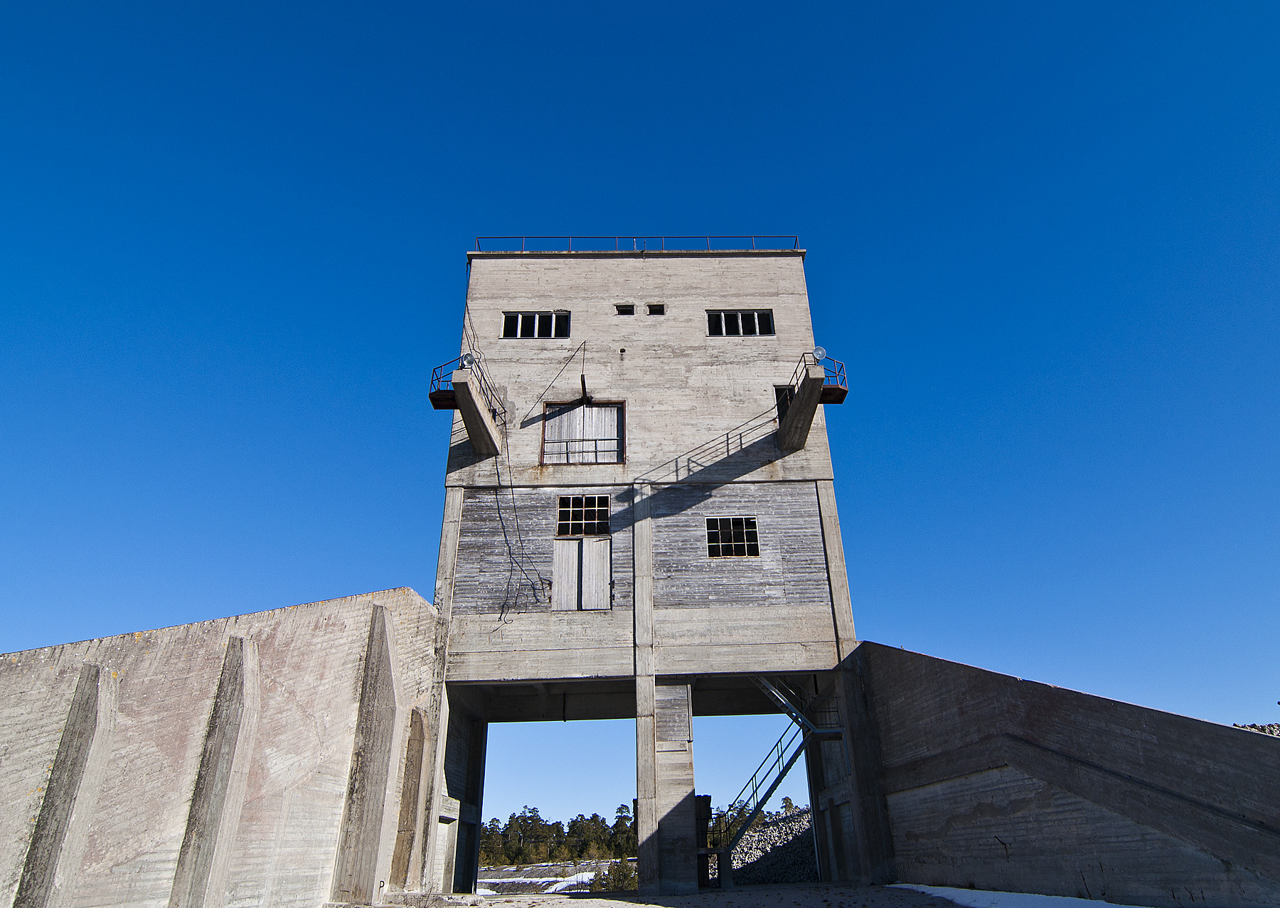 Industrimiljö